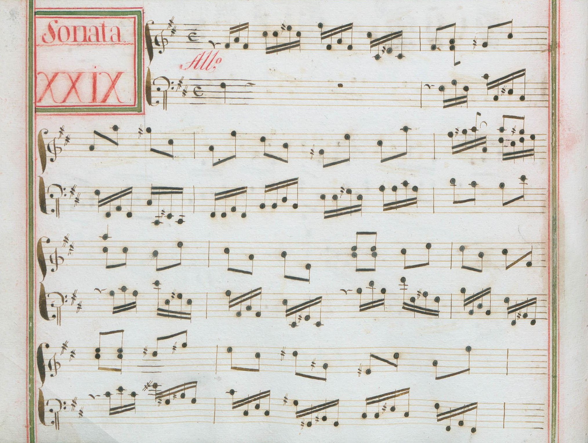 La sonate K. 67, telle qu'elle se présente dans le manuscrit de Venise, volume XIV no. 29.